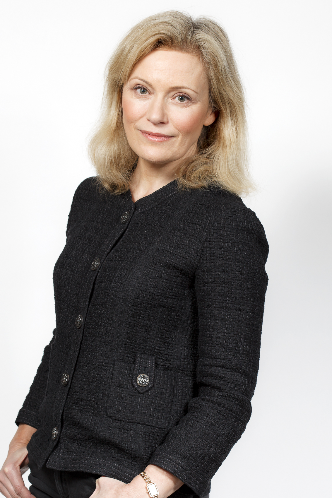 Nathalie Boy de la Tour, Présidente de la Ligue de Football Professionnel (Paris, France)